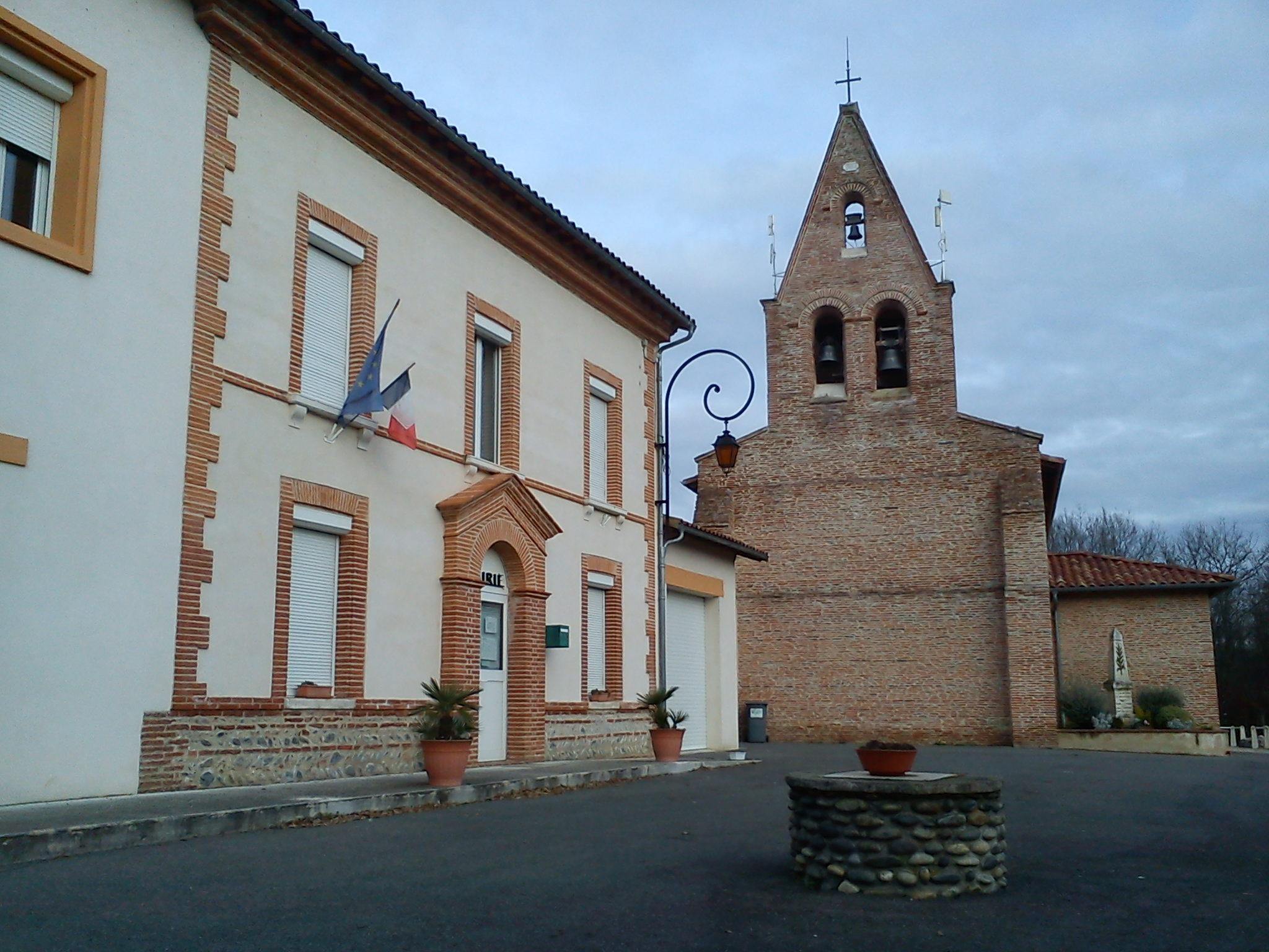 Goutevernisse